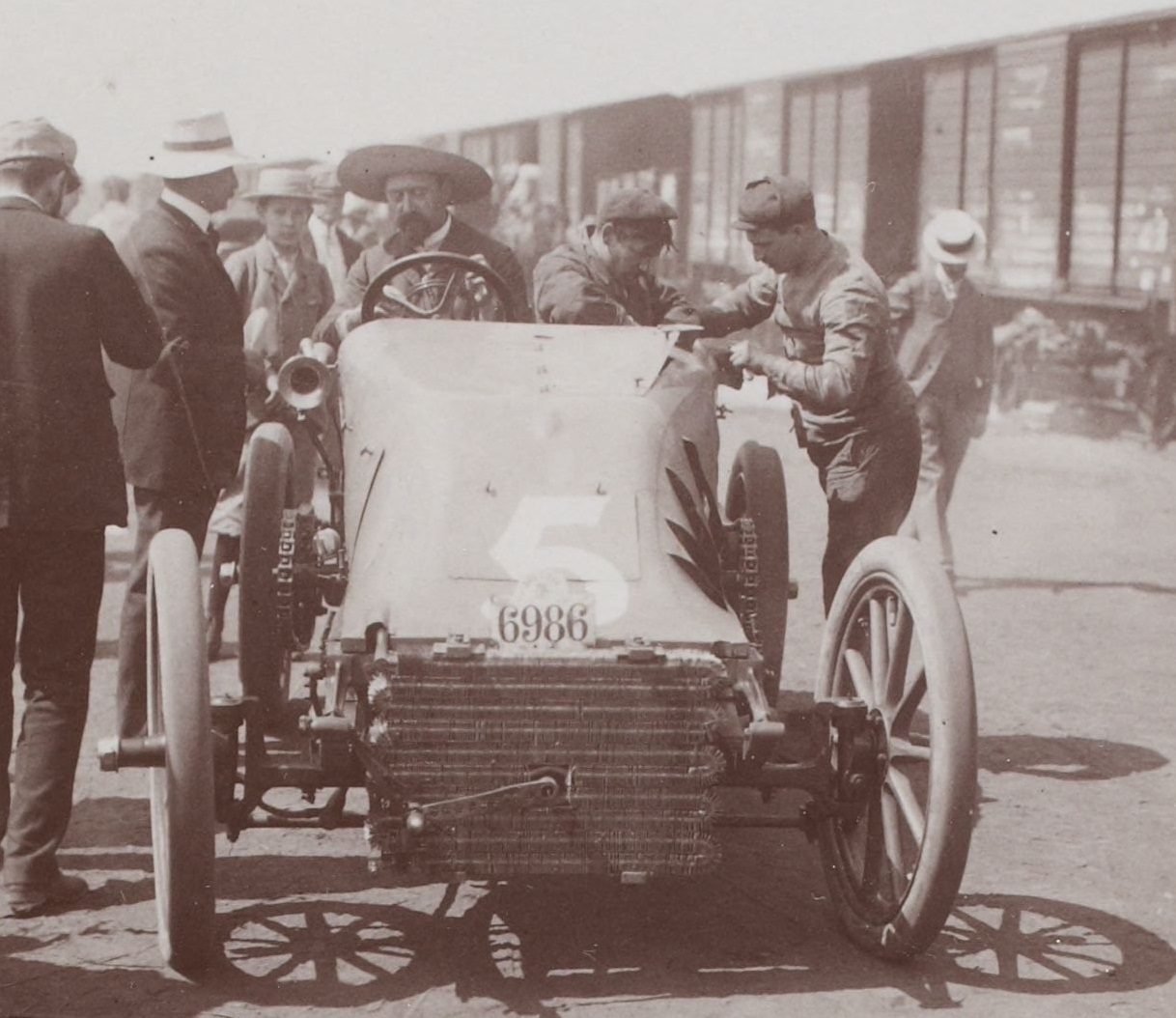 [Collection Jules Beau. Photographie sportive] : T. 27. AnnÃ©e 1904 / Jules Beau : F. 20v. [Circuit des Ardennes, 23 juillet 1904]